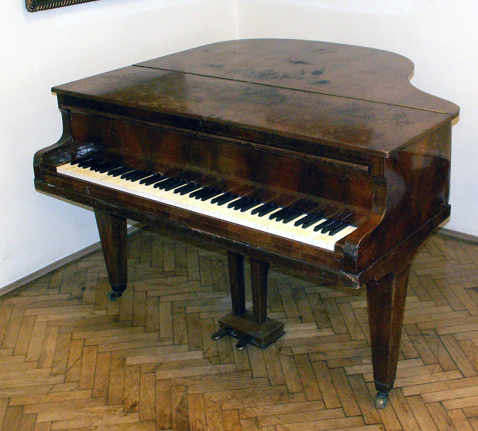 Fortepian Bruno Sommerfeld Bromberg numer seryjny: 7730